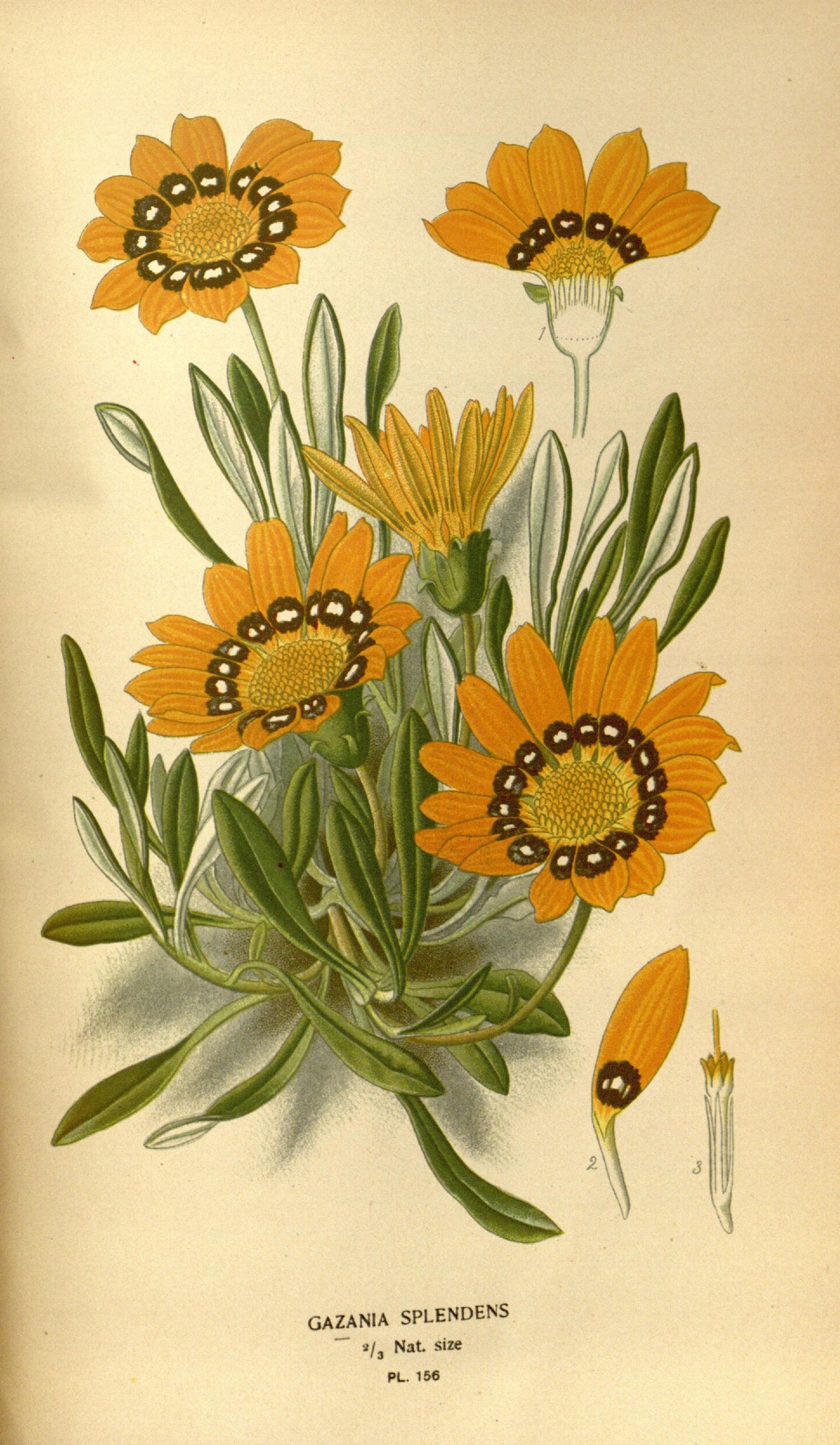 GAZANIA SPLENDENS